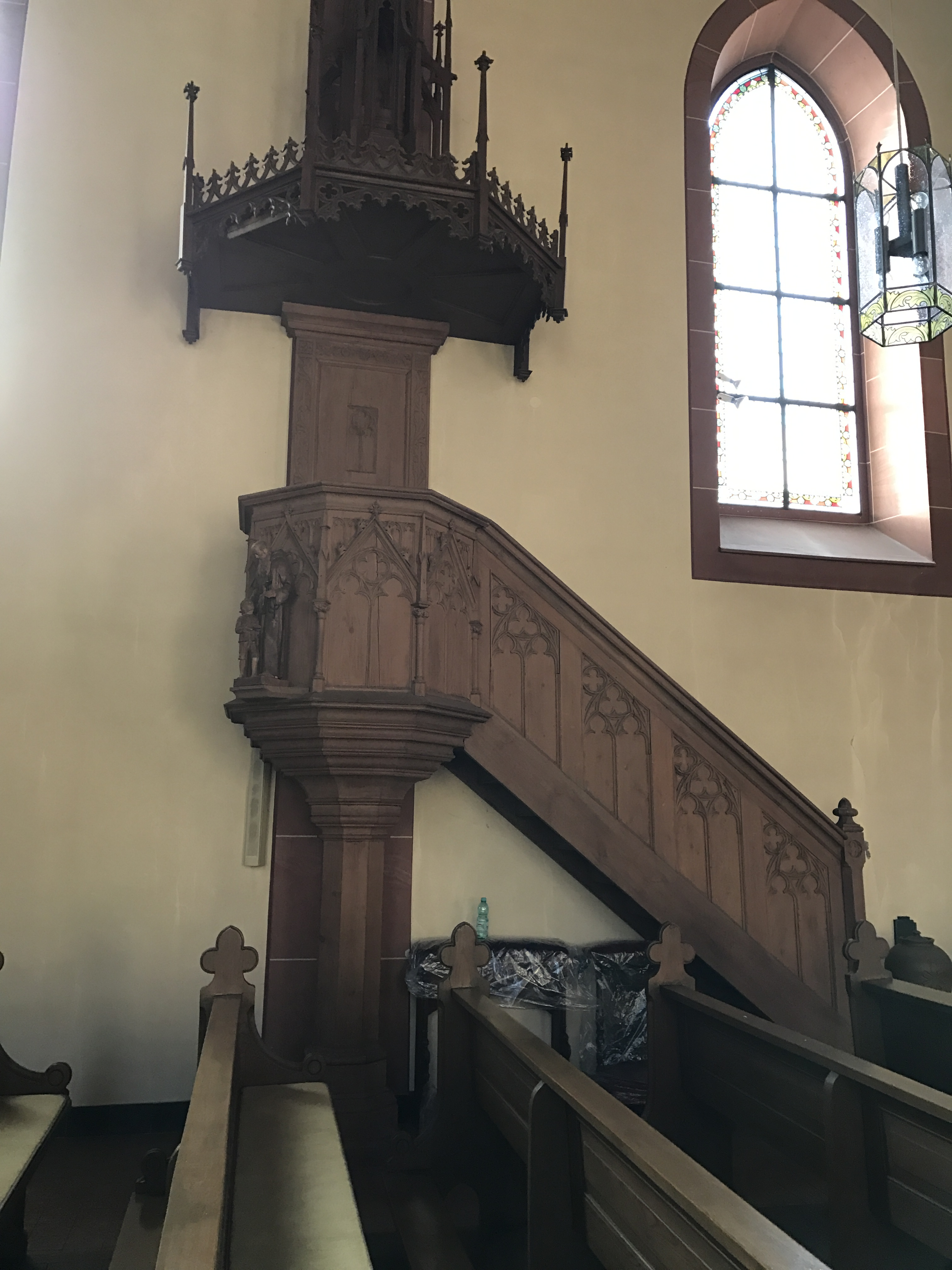 Die Martinskirche in Gamburg im Main-Tauber-Kreis.